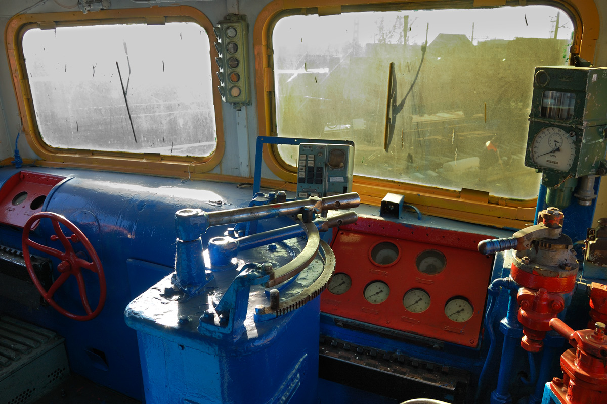 Кабина электровоза ВЛ23-401, музей СамГУПС